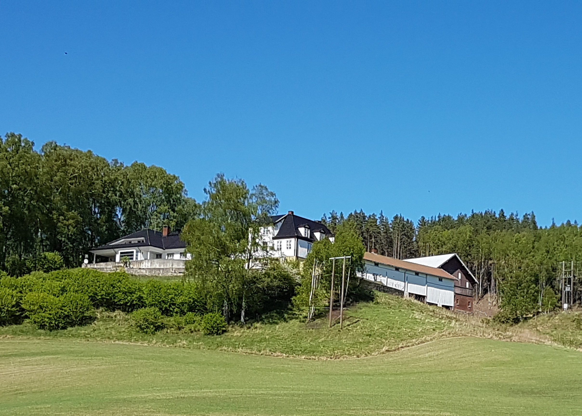 Eggeroa eller Egge gård i Ullerål, Ringerike kommune, Buskerud